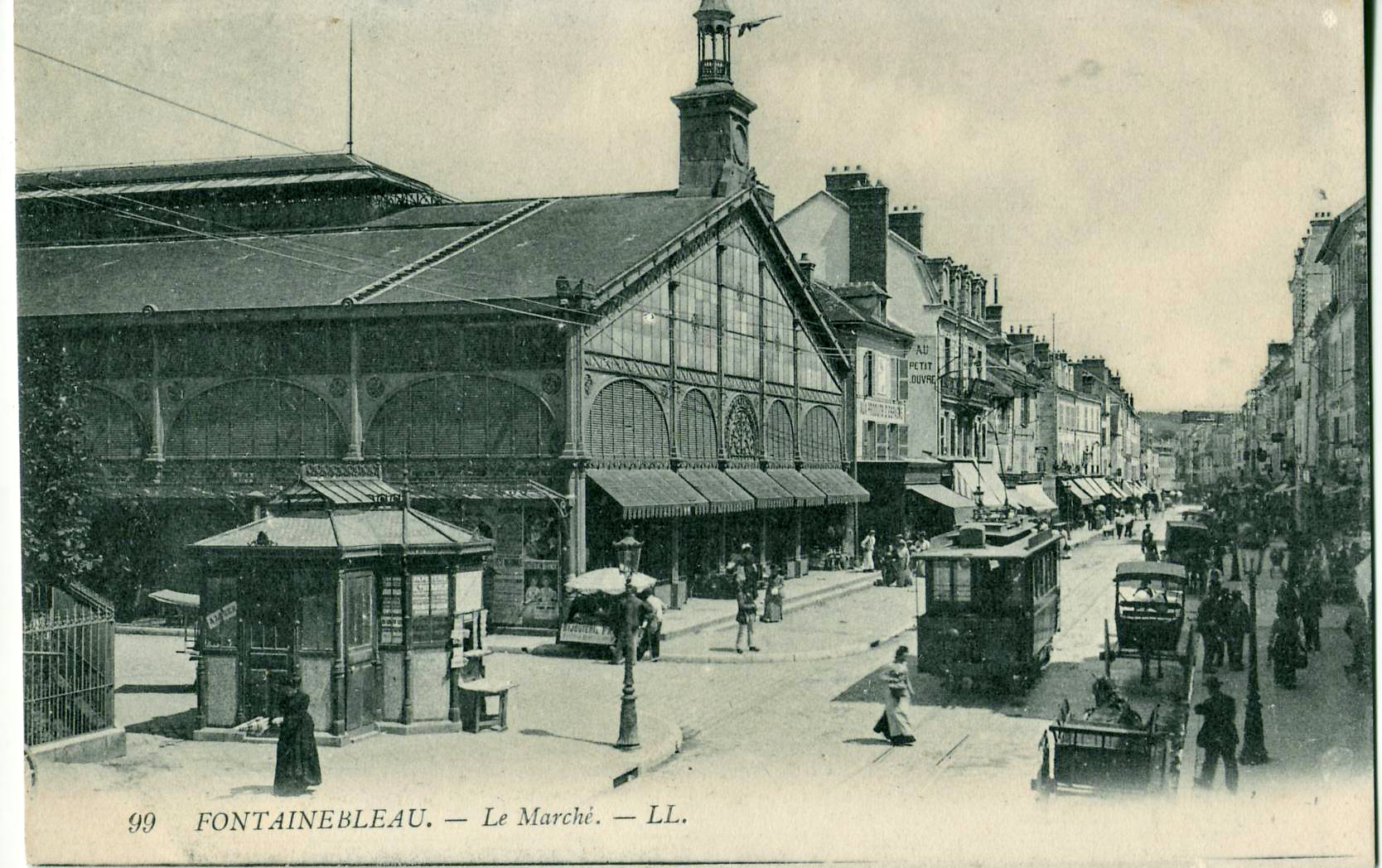 Carte postale ancienne éditée par LL, n°99 : FONTAINEBLEAU - Le marché.Vue d'une motrice du tramway de Fontainebleau